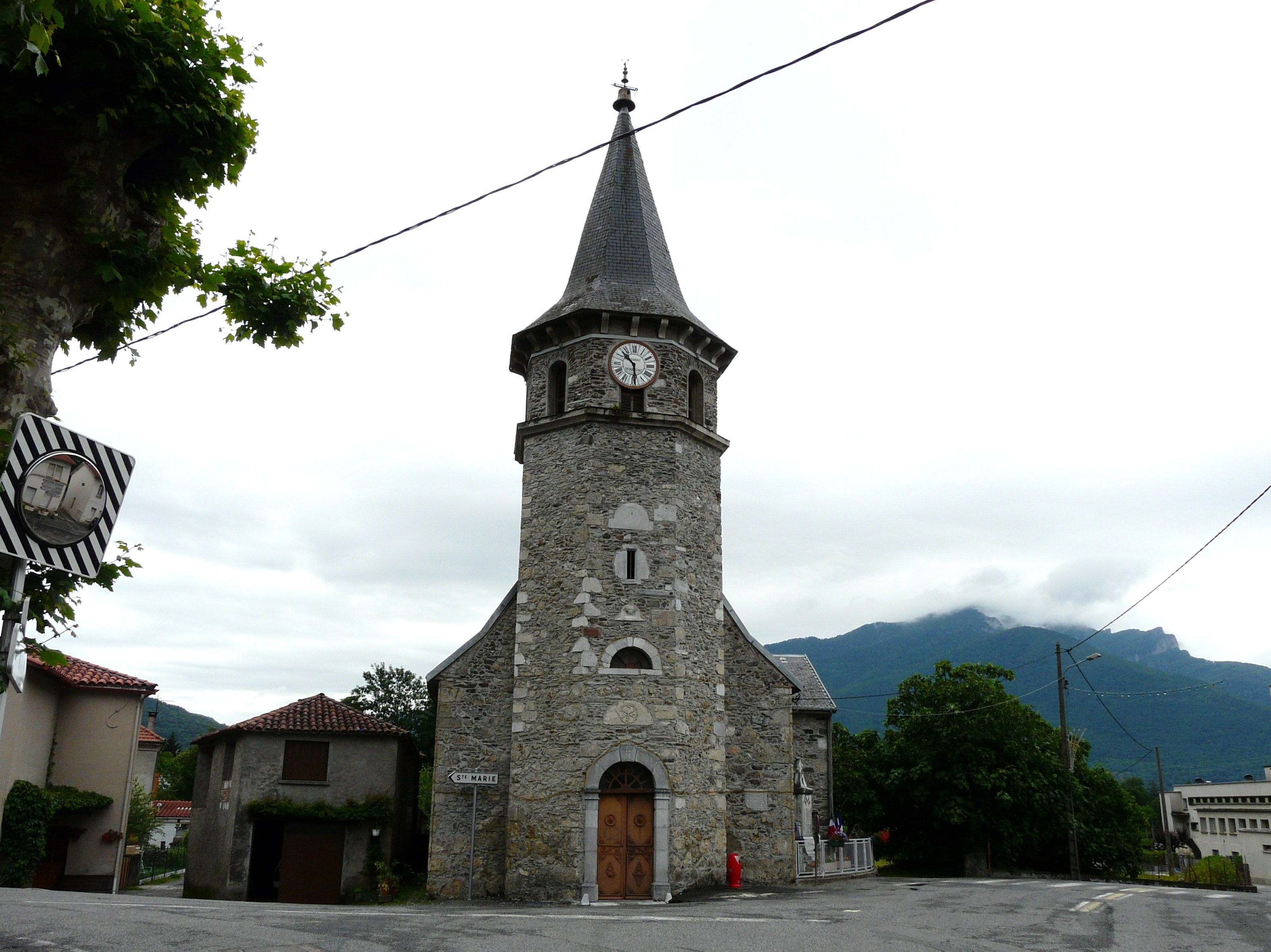 L'église de Siradan, Hautes-Pyrénées, France.